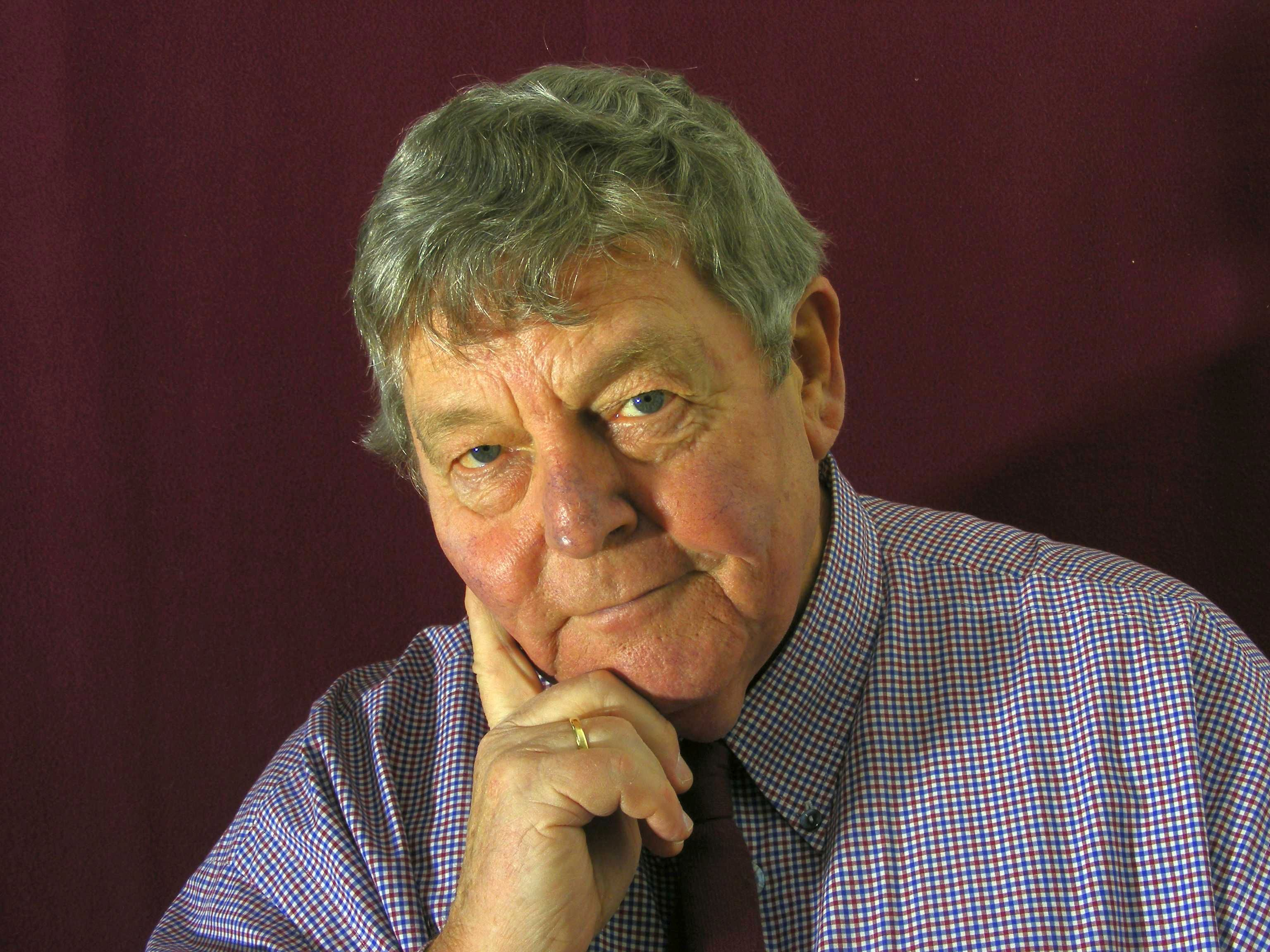 Otto Pötter - Pressefoto 3